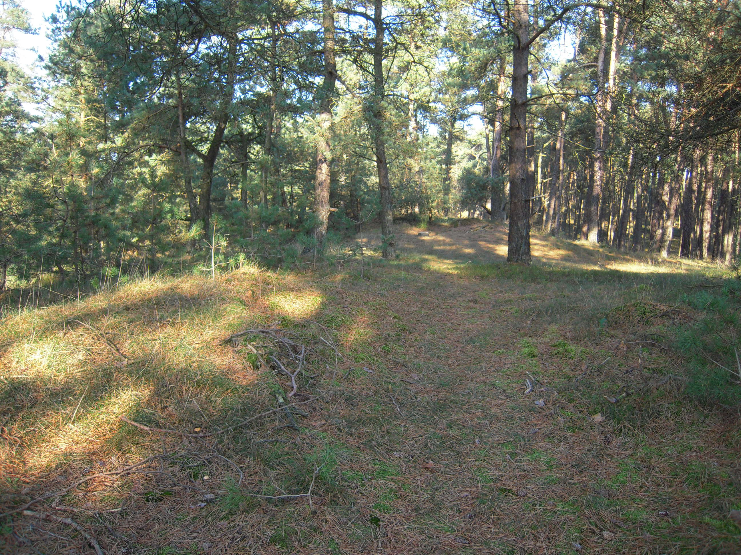 Signaal Imbosch, high point Veluwe, Netherlands